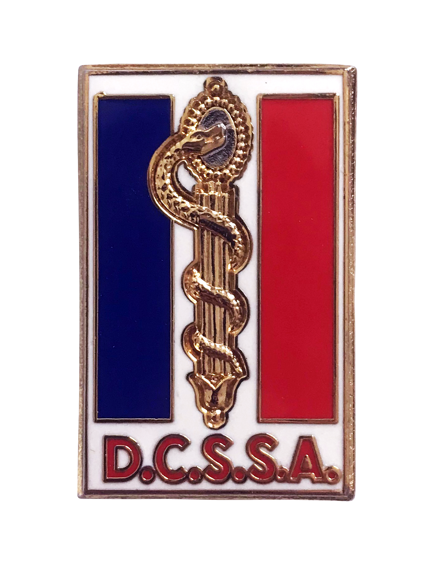 Insigne de la direction centrale du Service de santé des armées (DCSSA, France)